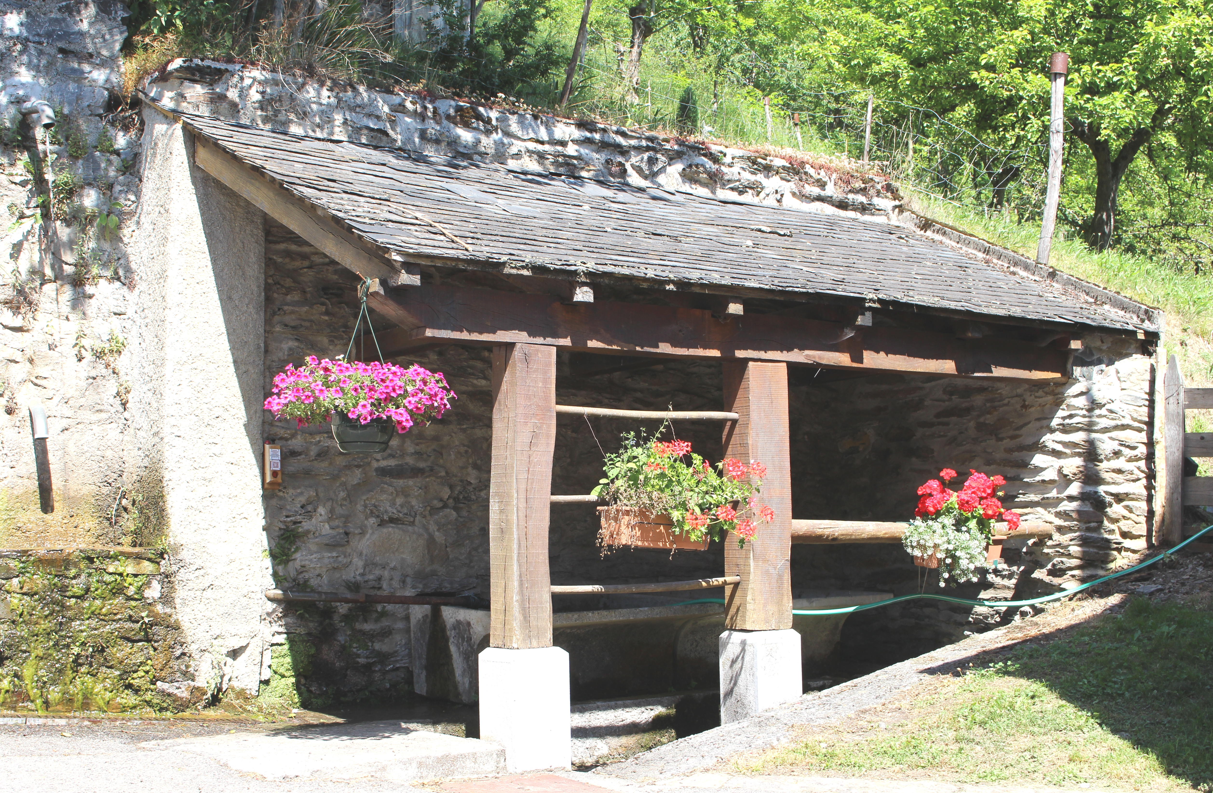 Lavoir de Cadeilhan (Hautes-Pyrénées)